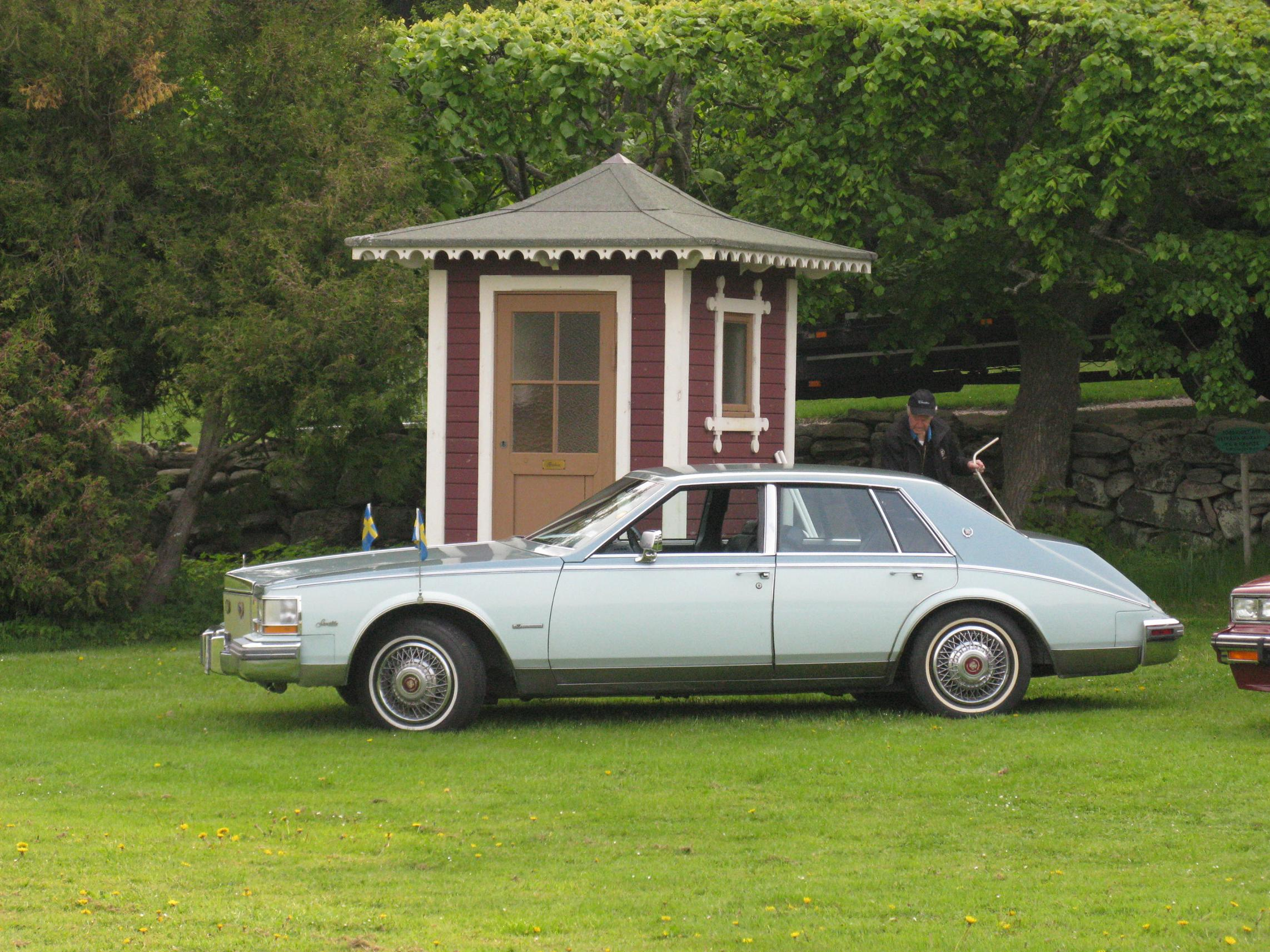 Cadillac Seville